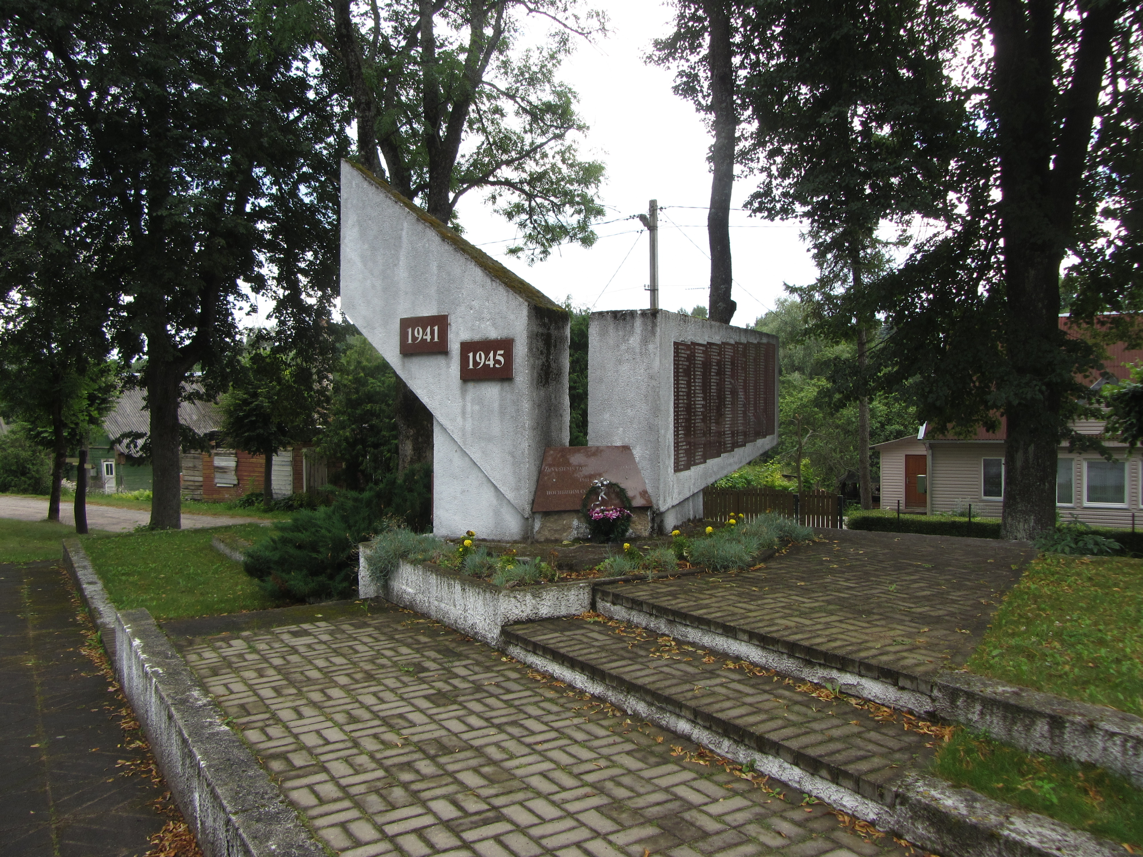 Antalieptė, Lithuania